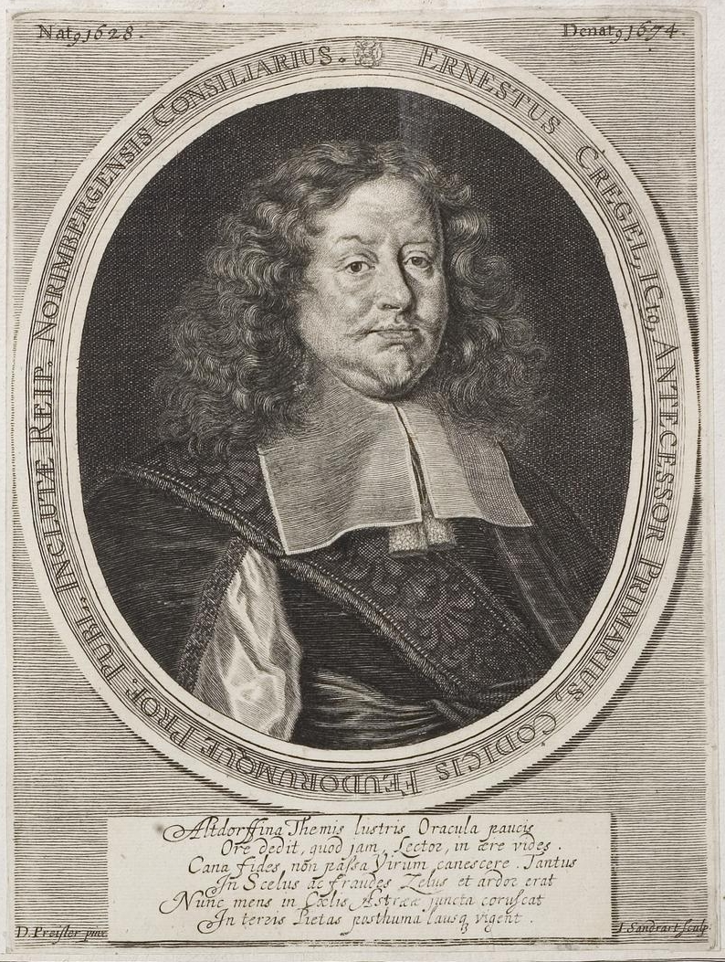 Grafik aus dem Klebeband Nr. 3 der Fürstlich Waldeckschen Hofbibliothek Arolsen Motiv: Ernst Cregel (1628–1674), Prof. der Rechte in Altdorf